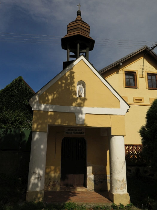 Kaplička, u silnice při čp. 1, Mezihoří (okres Klatovy).